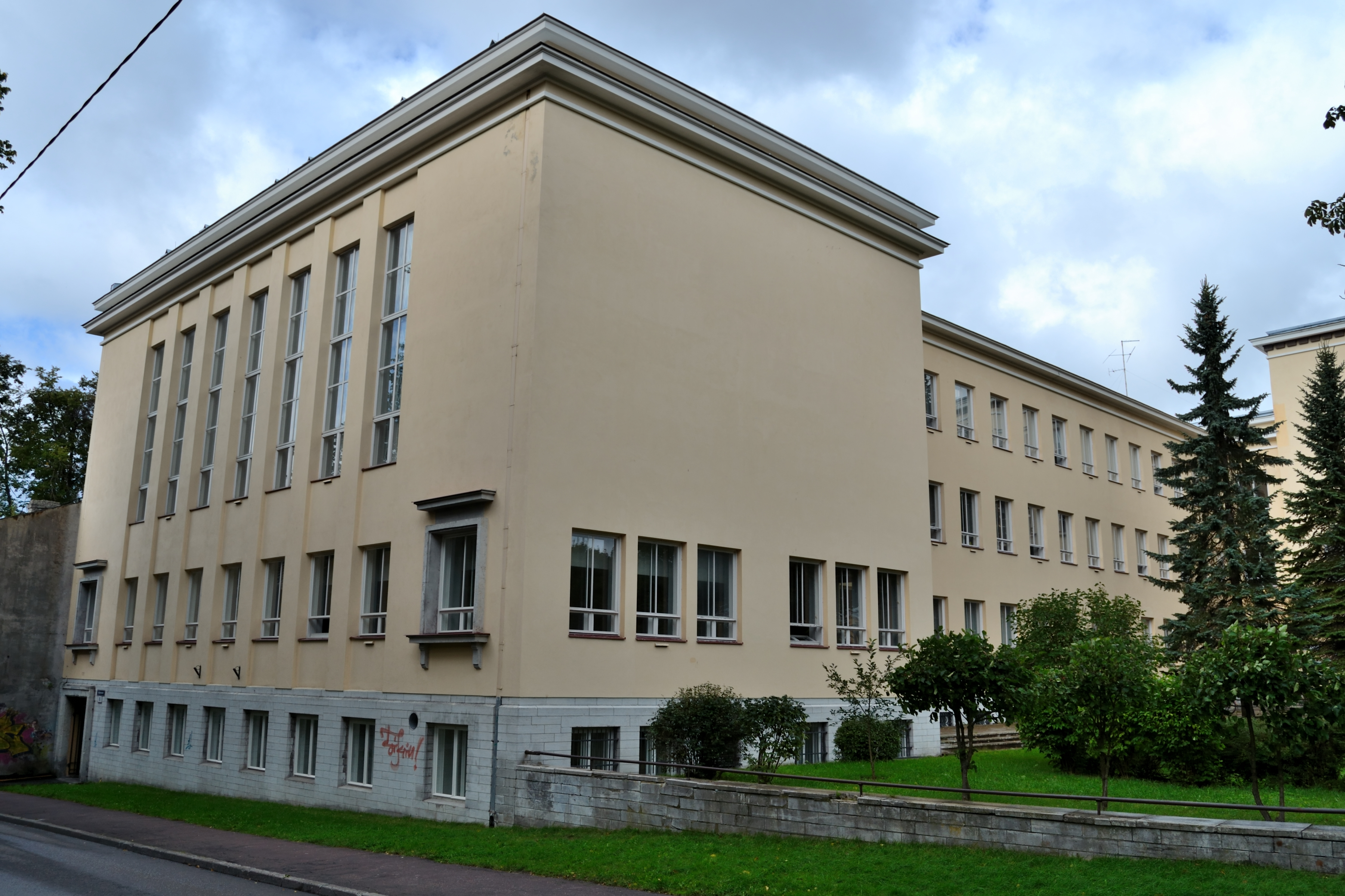 Tallinn, koolihoone Kevade 8, 1940